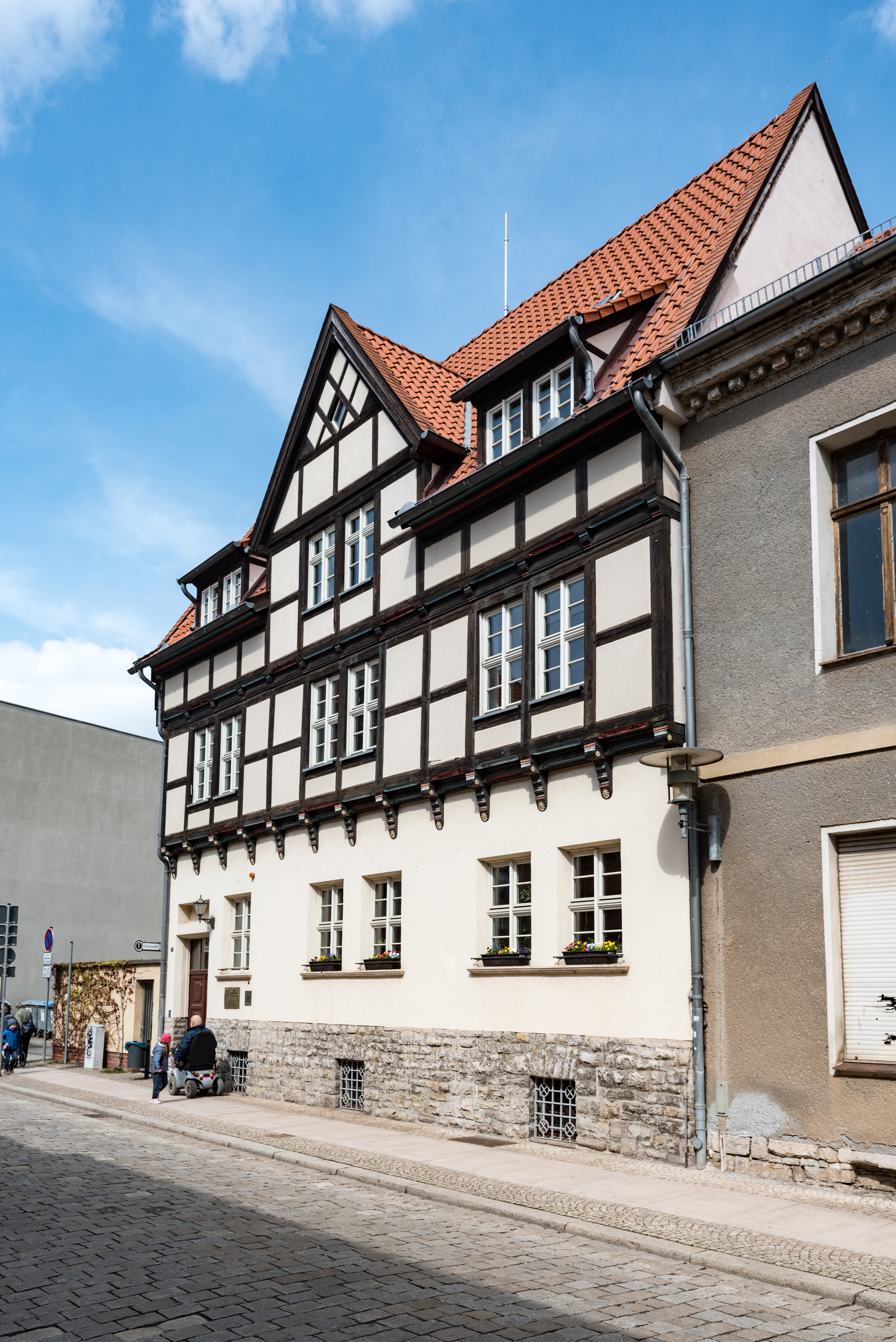 Aschersleben, Hohe Straße 7